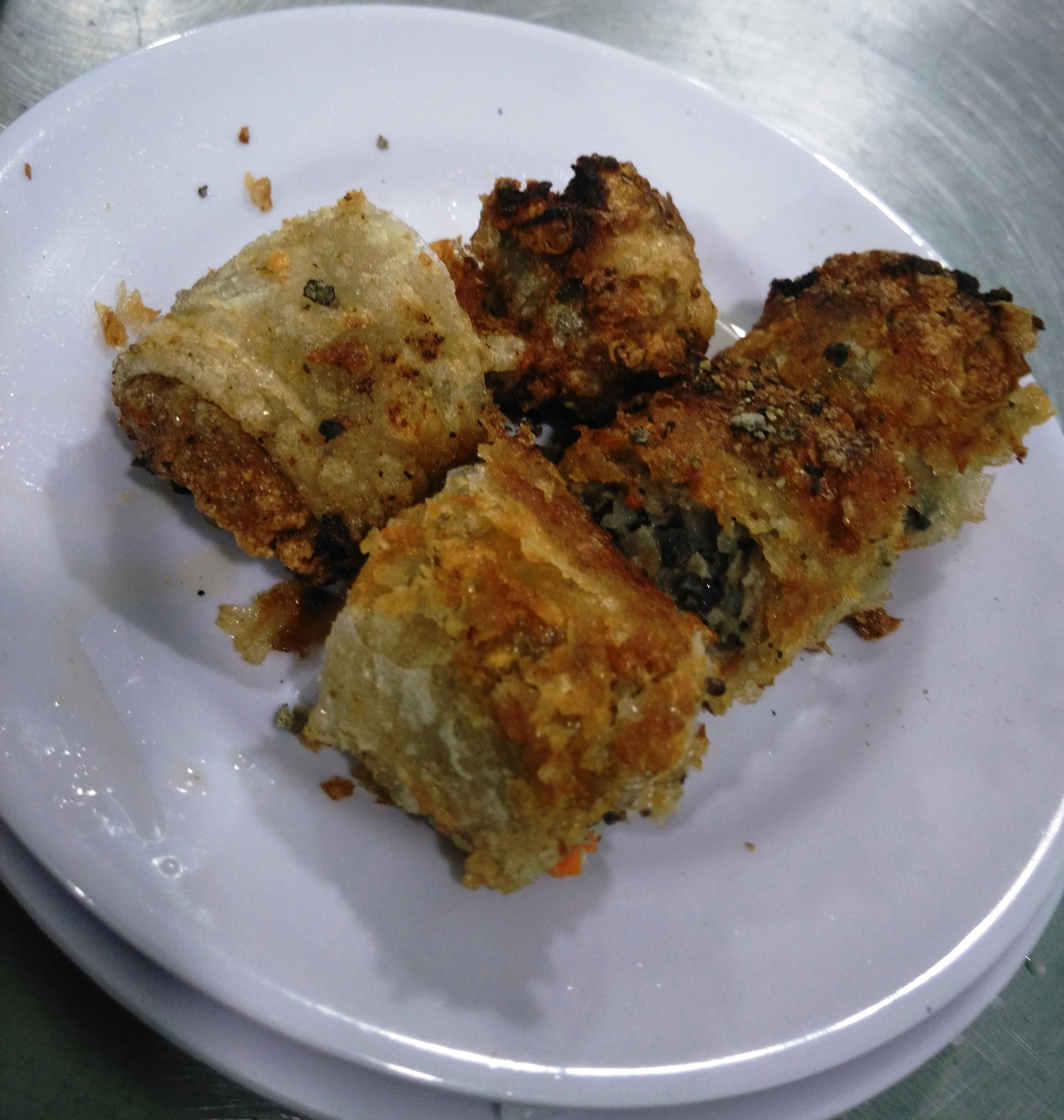 Nem cua bể Hà Nội tại Nguyễn Sơn, Tân Phú, tháng 9 năm 2018